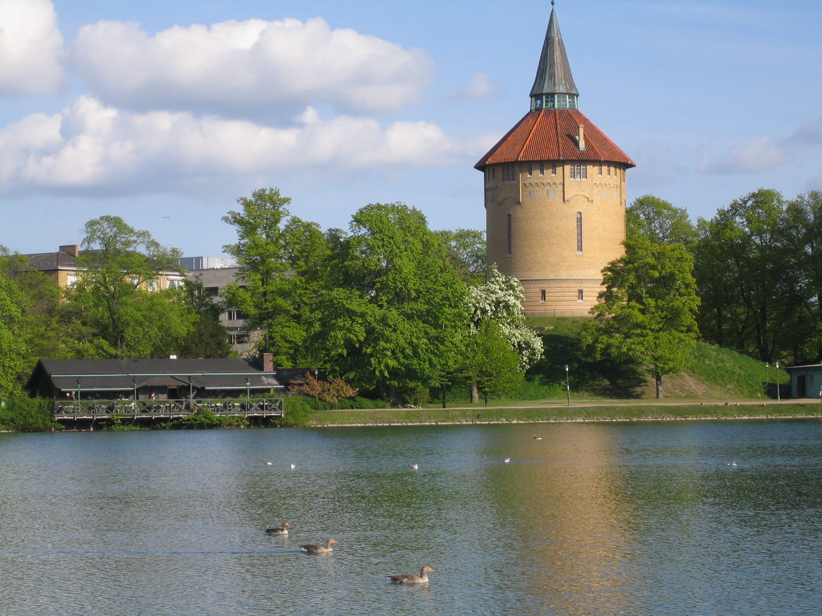 Vattentornet i Pildammsparken, Malmö. Tagen av mig själv 17 maj 2005.